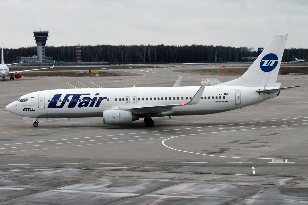 UTair, VQ-BJI, Boeing 737-8AS